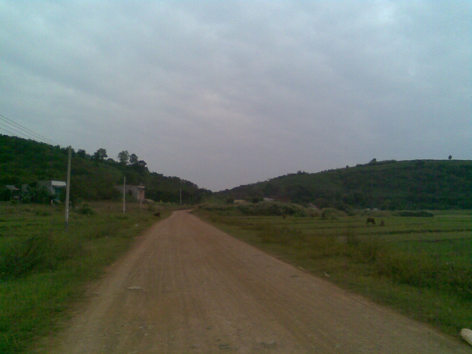 Con đường dẫn vào Nam Dong